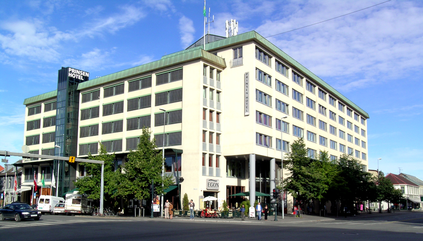 Hotell Prinsen, Prinsens gate, Trondheim, Norway .